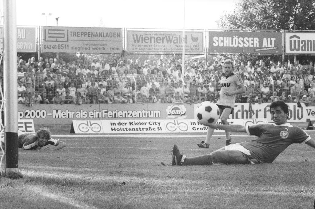 Freundschaftsspiel im Holsteinstadion vor 6.000 Zuschauern.